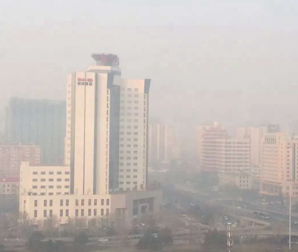 2015年第二次北京雾霾红色预警从12月19日至22日，空气污染严重